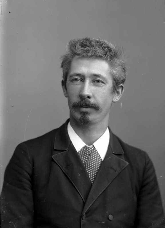 Fotograf Severin Worm-Petersen (1857-1933) fotografert av L. Szacinski i 1899. Bildet tilhører Oslo Bymuseum og er lagt ut på